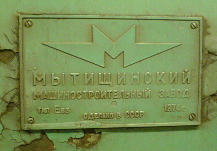 A budapesti metró részére 1974-ben gyártott szerelvény (Ev3) gyártási adatai (ld. Metrovagonmas) Inscriptions: мытищинский машиностроиельный завод тип Ев3 1974г. сделано в СССР